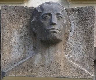 Chotěboř - pamětní plaketa Františka Buttuly na průčelí školy čp. 74 v Buttulově ulici